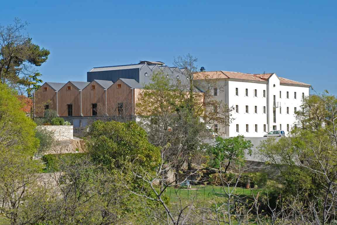 La Cascade, maison des arts du clown et du cirque (vue éloignée du bâtiment)